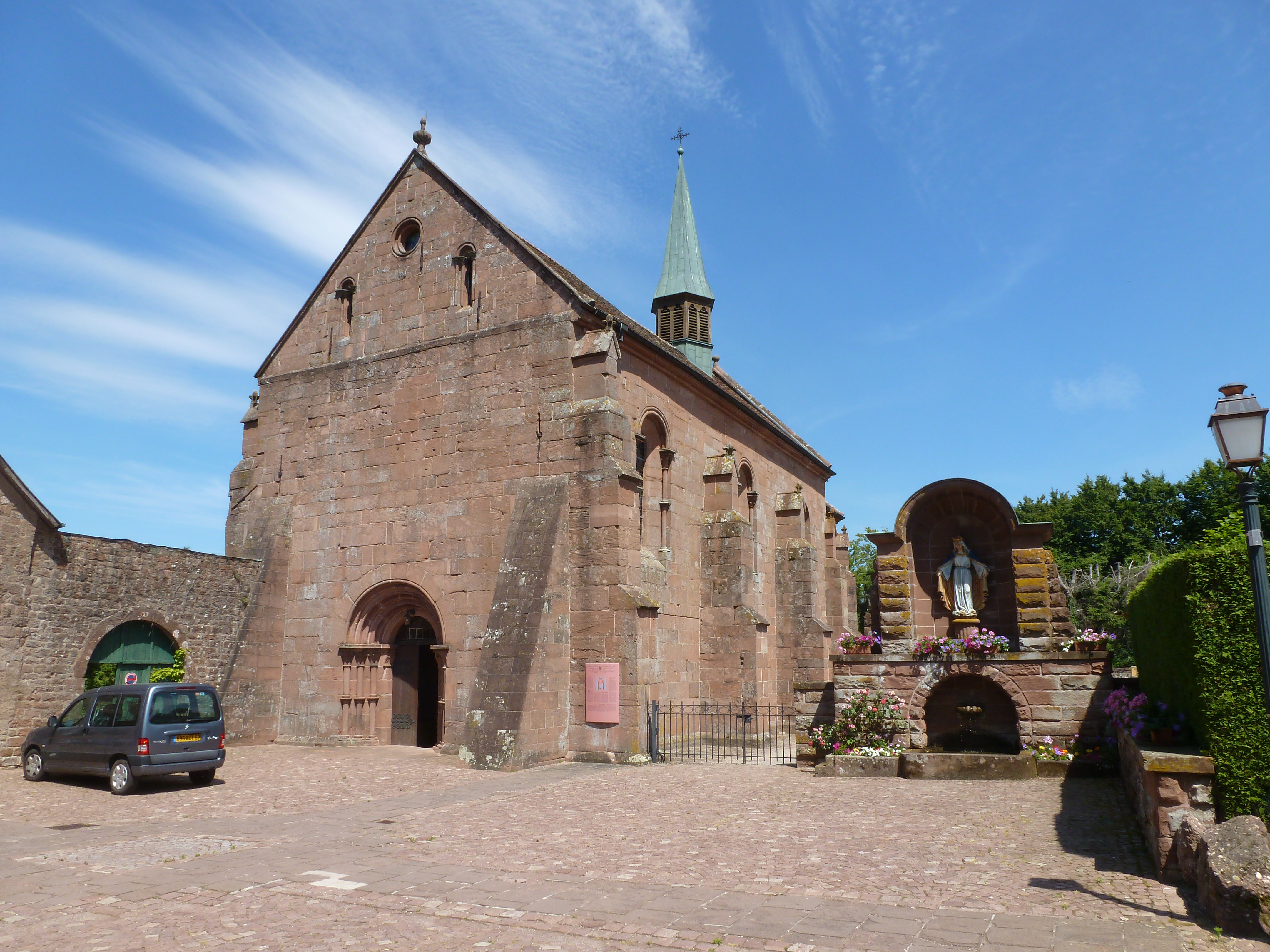 Chapelle Sainte Marie de l’Assomption, bâtie au XIIIème siècle, à Obersteigen (commune de Wangenbourg-Engenthal, Bas-Rhin, Alsace). Vue extérieure.